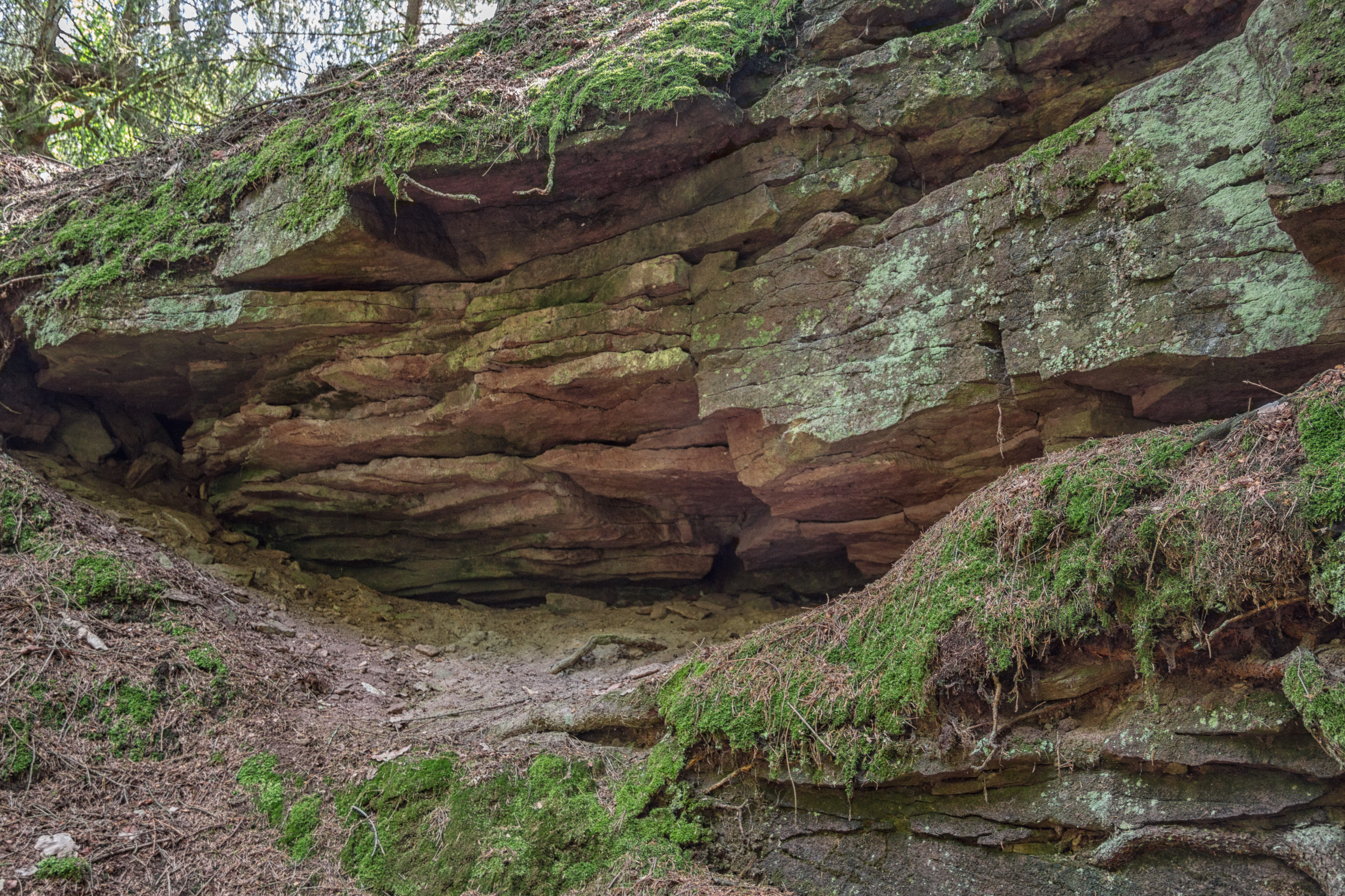 Steinbrüche bei Wendelstein, Wernloch, LSG Schutz des Landschaftsraumes im Gebiet des Landkreises Roth - "Südliches Mittelfränkisches Becken östlich der Schwäbischen Rezat und der Rednitz mit Vorland der Mittleren Frankenalb" (LSG Ost), FFH-Gebiet, Kornberge bei Worzeldorf, Vogelschutzgebiet, Nürnberger Reichswald